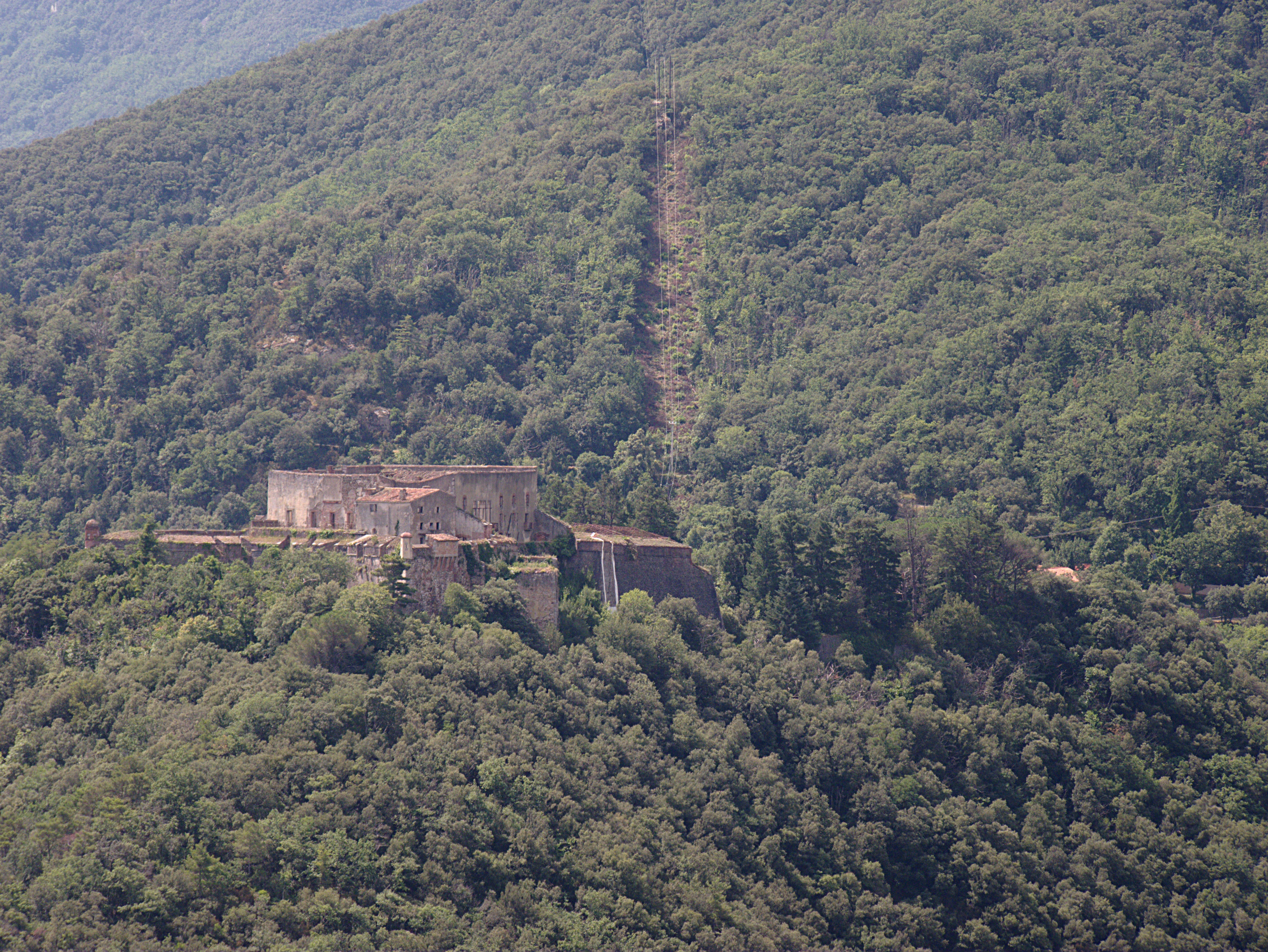 Fort les Bains, Amélie-les-Bains-Palalda (Pyrénées-Orientales, Languedoc-Roussillon, France)